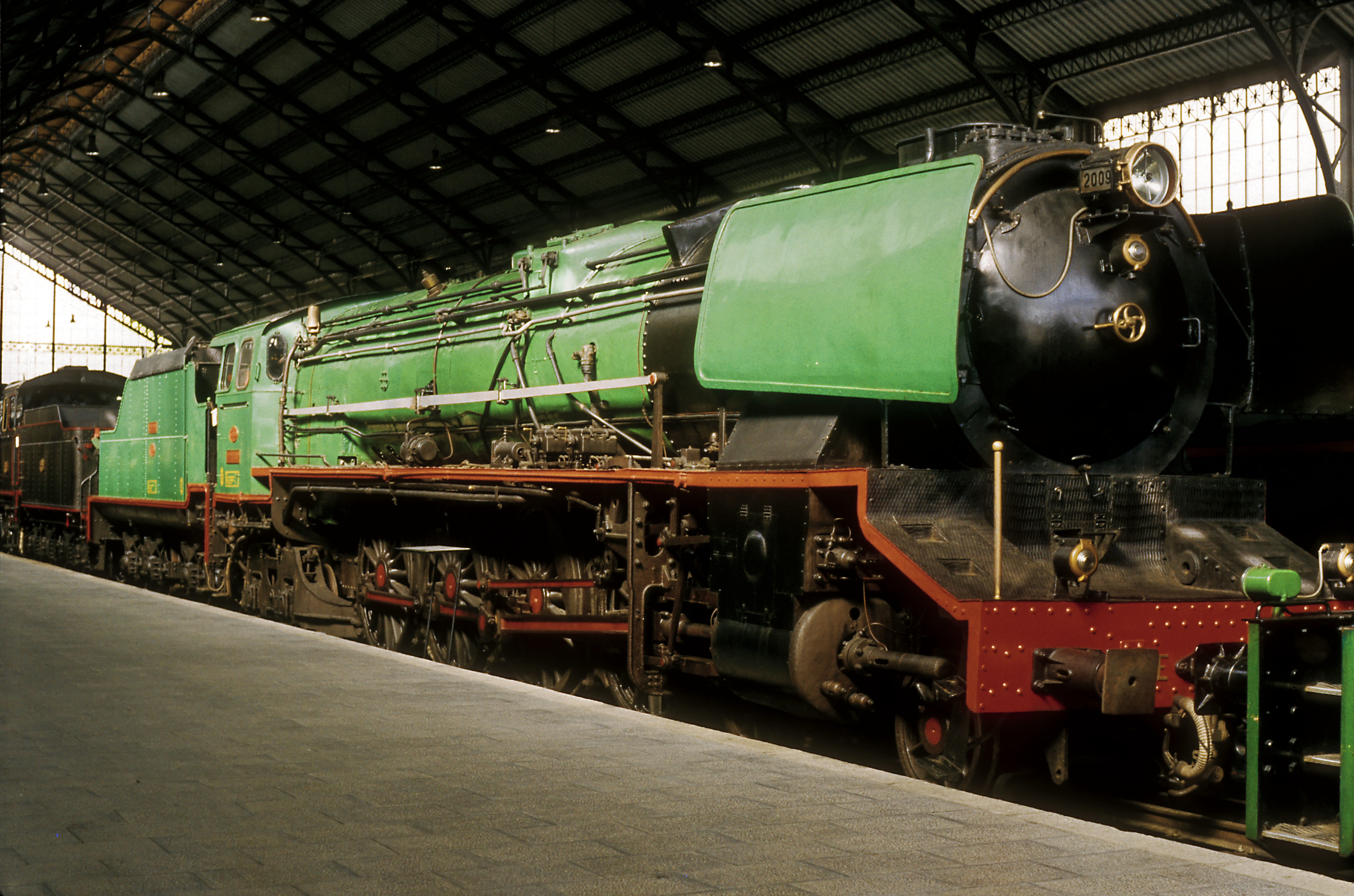 neuzeitliche 2’D2’h2-Schnellzuglok mit Delta-Schleppgestell, gebaut 1955 in Barcelona. Schnellste spanische Dampflokomotive, wie bei den meisten spanischen und französischen Dampflokomotiven gibt es wegen des breiten Tenderkastens keine echte Sicht bei Fahrt mit dem Tender voraus.